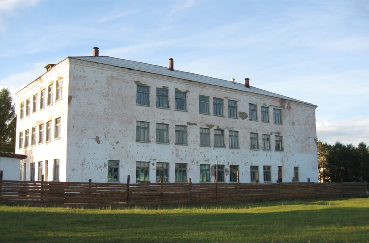 фото школы